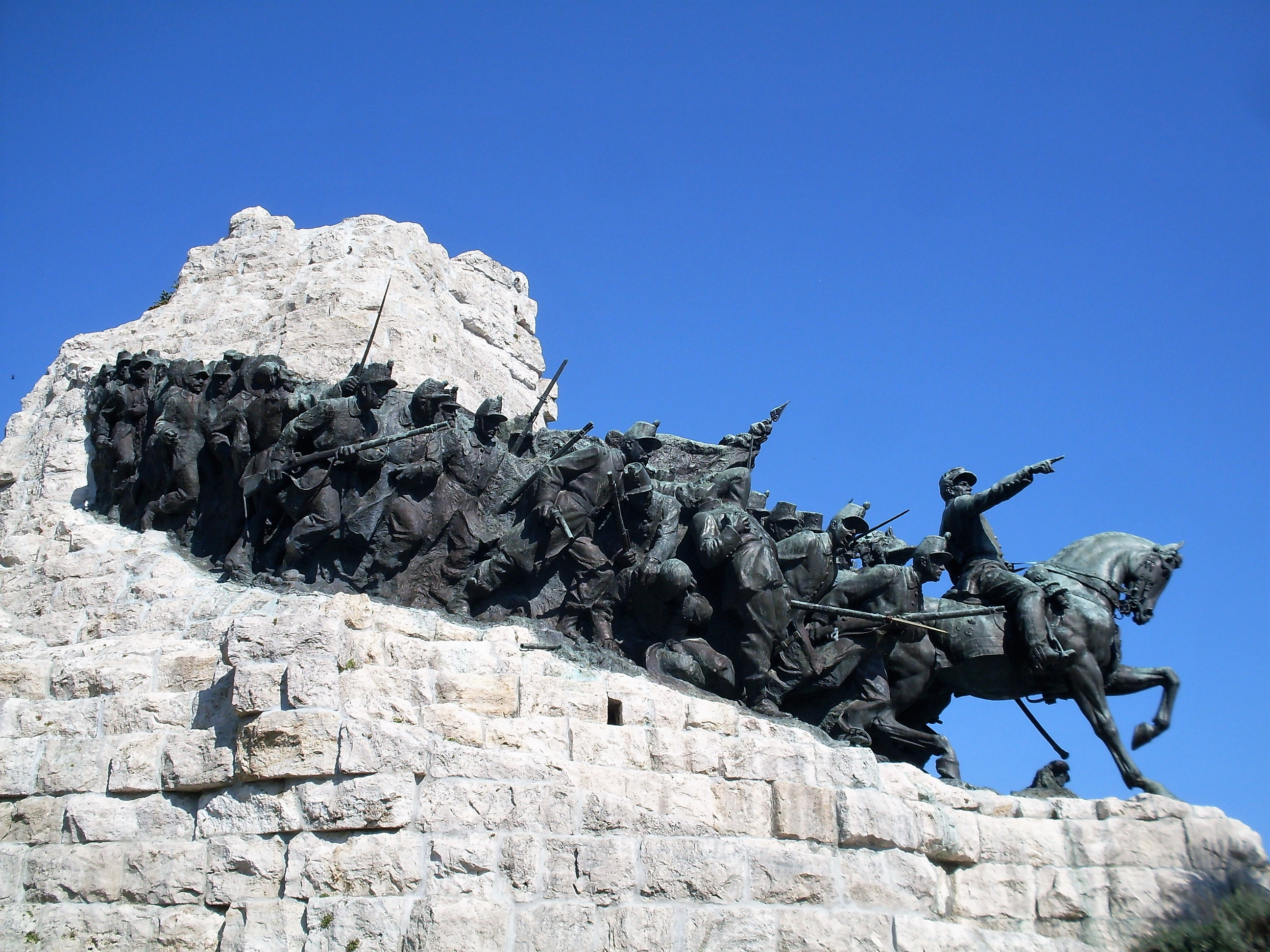 Castelfidardo Monumento Battaglia 1860